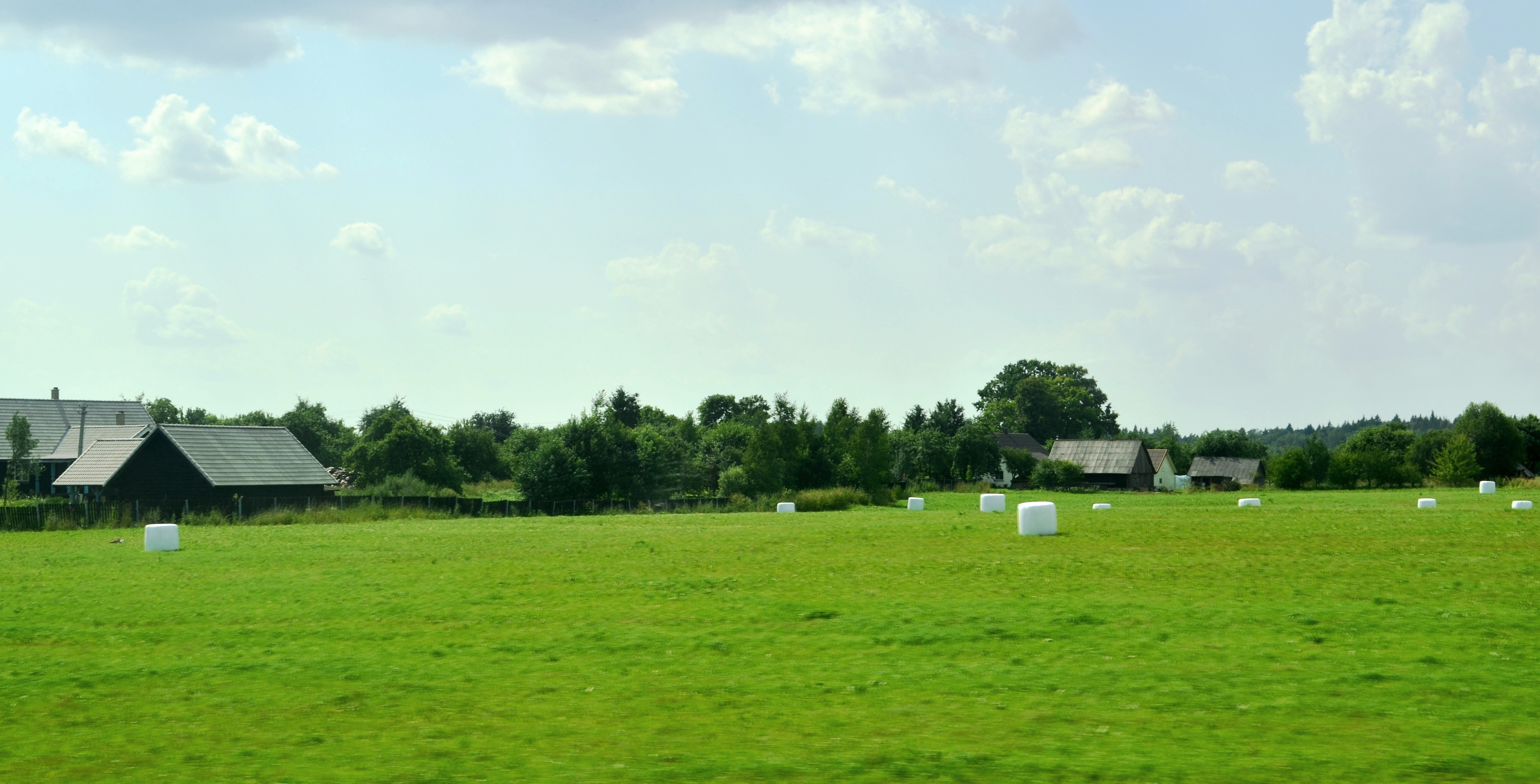 Kunigiškiai II, Širvintų raj.